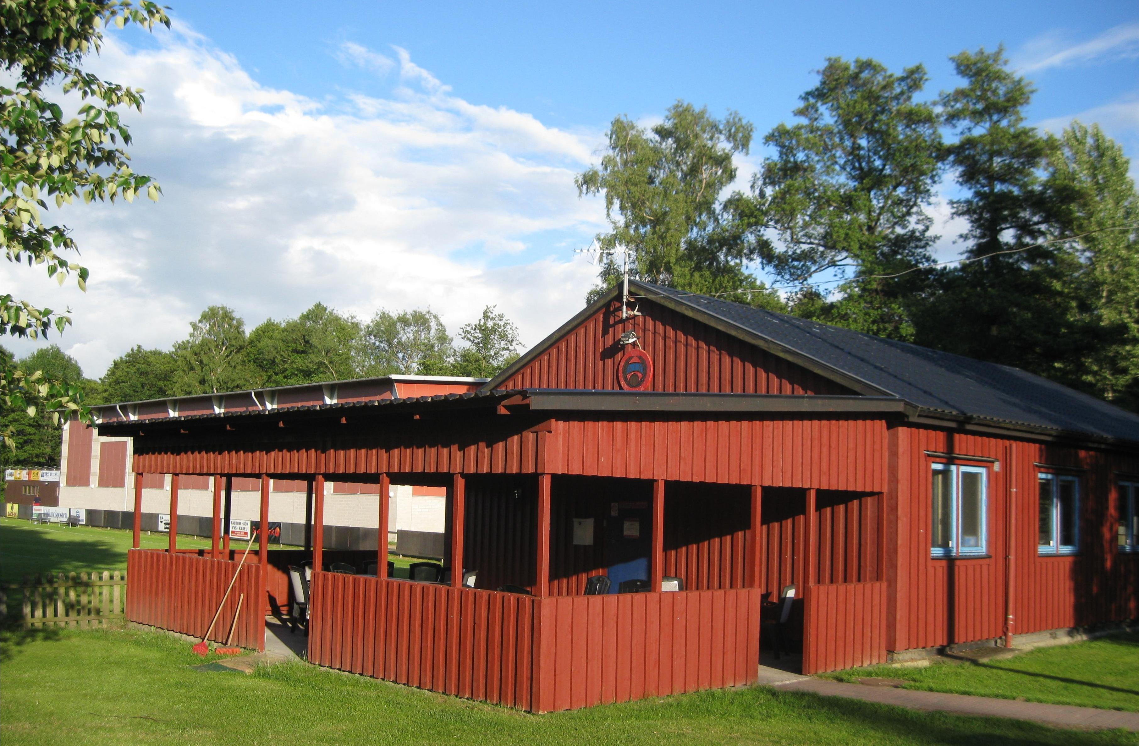 Fotbollsklubben Alet IK:s klubbhus på Alevallen i Halmstad.